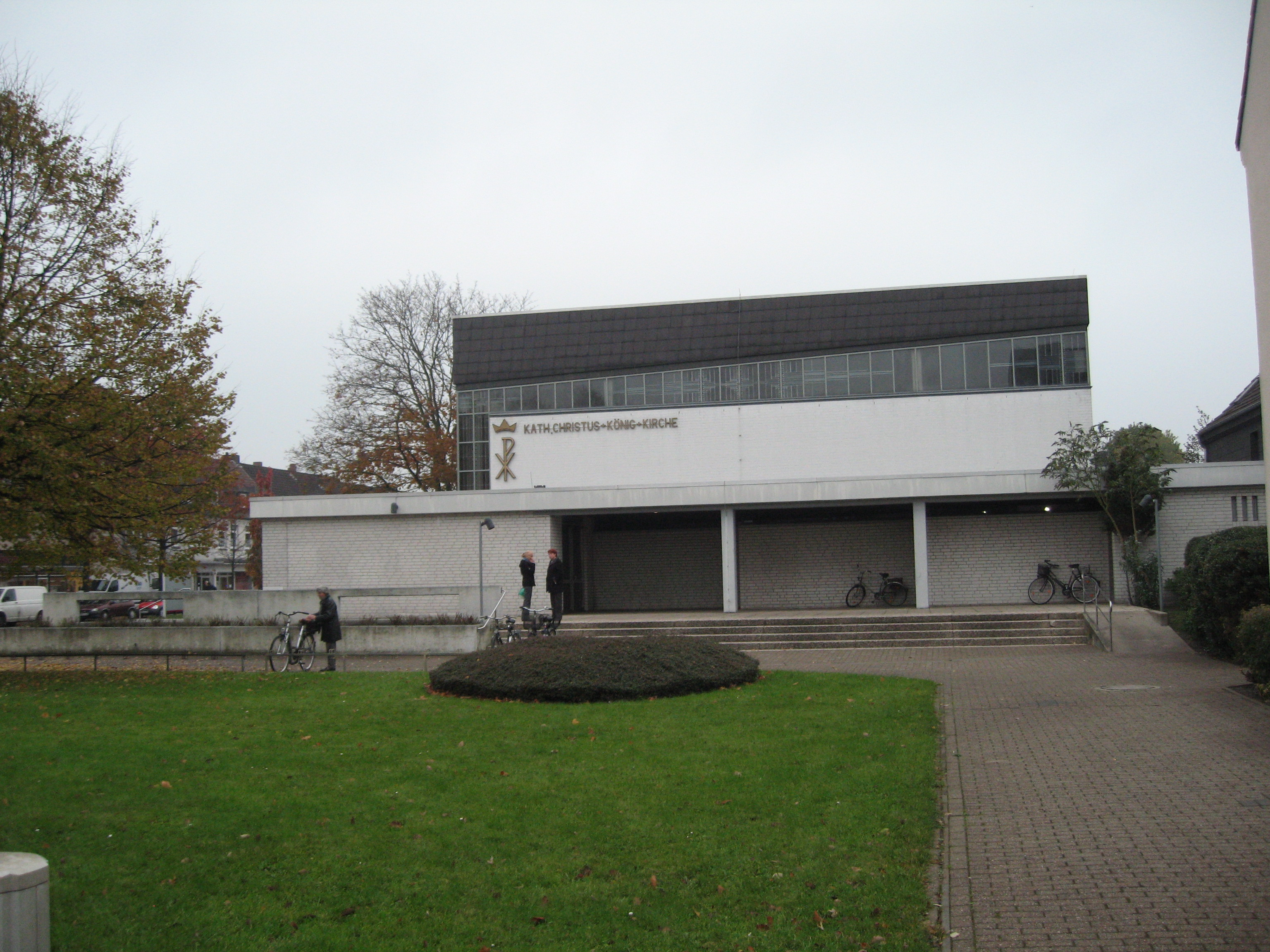 Christkönig Kirche in Wilhelmshaven